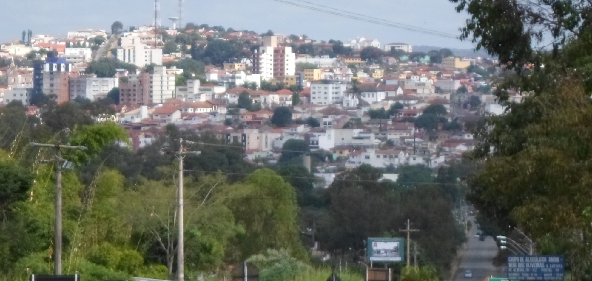 Oliveira vista ao longe